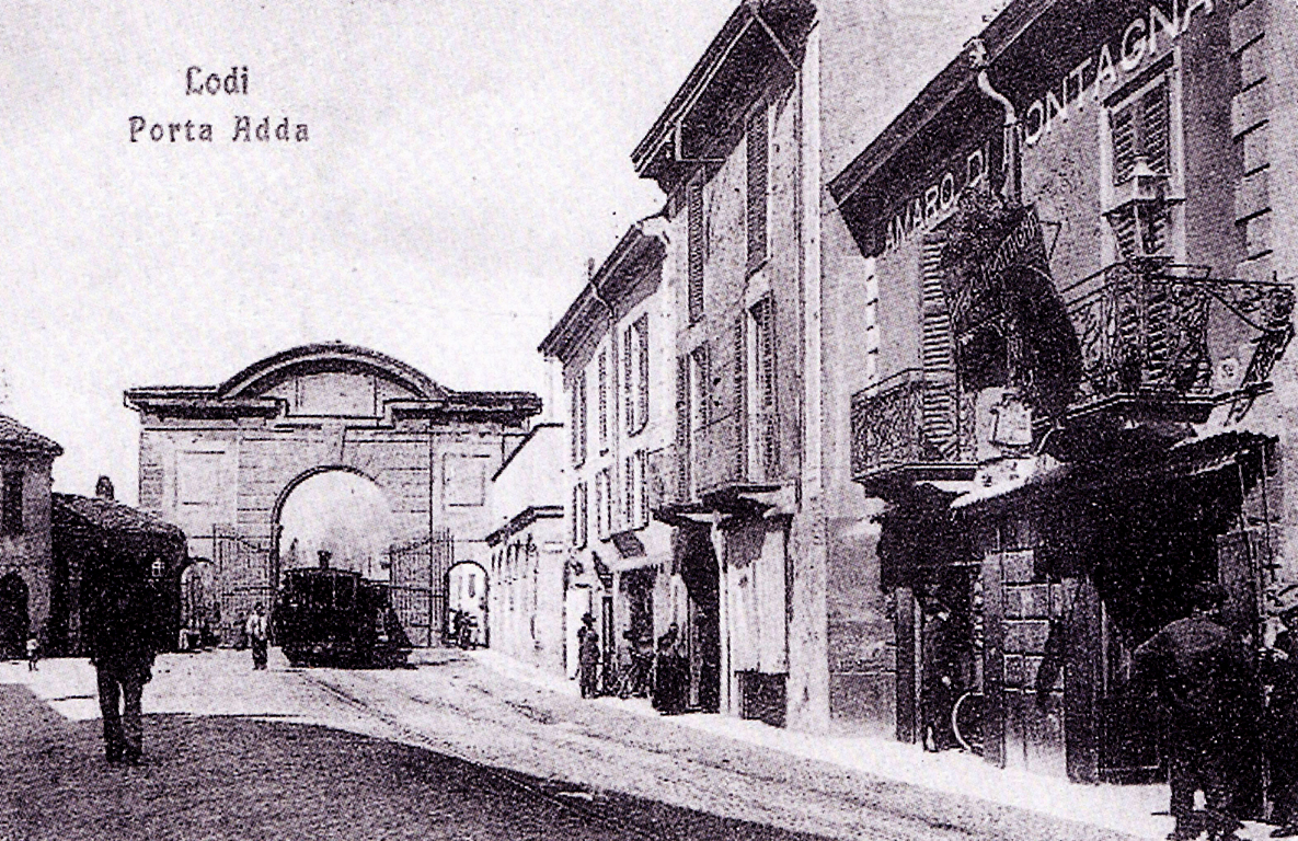 Vista di Porta d’Adda a Lodi con un tram della linea Lodi-Crema-Soncino.